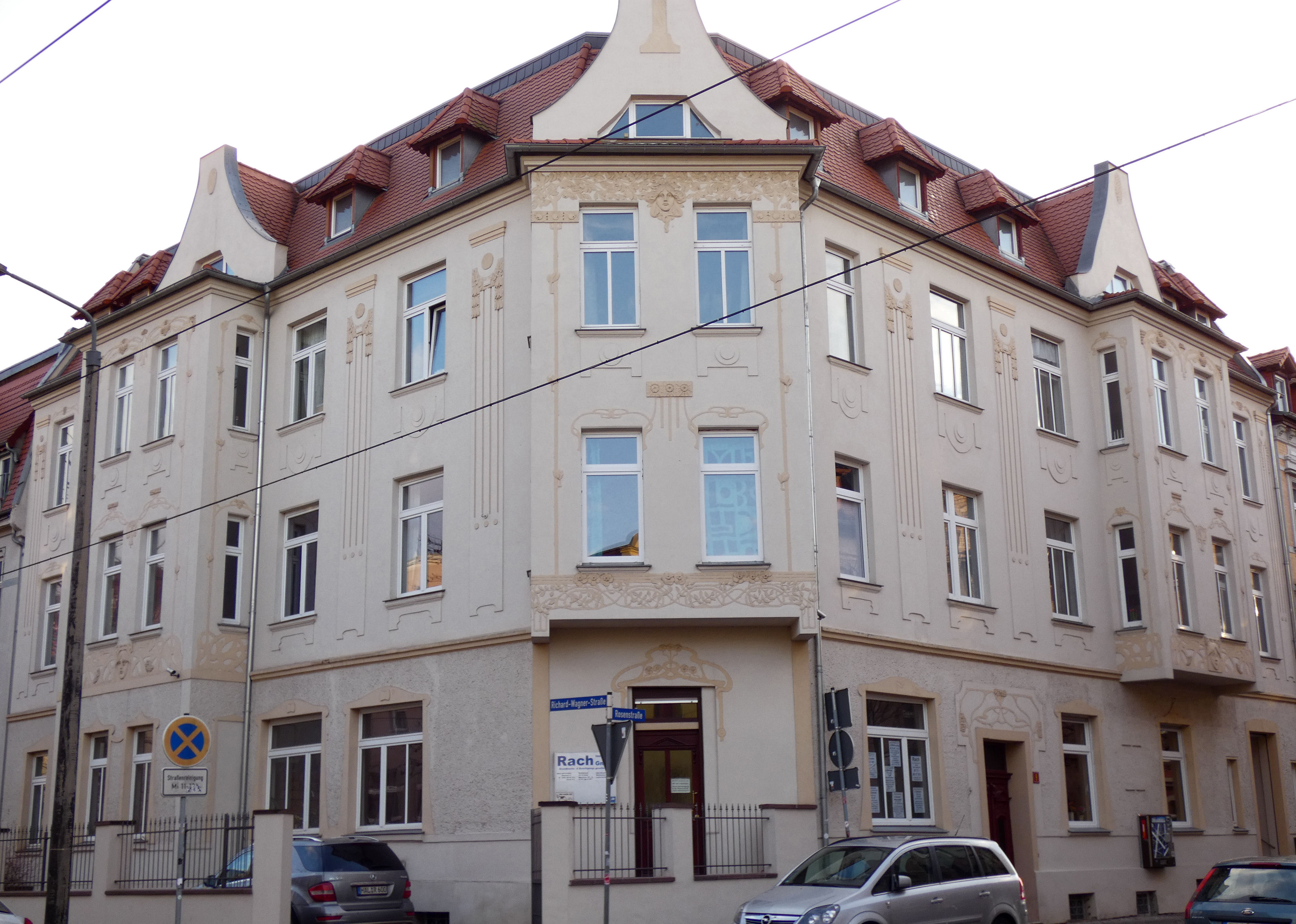 Rosenstraße 9, Halle (Saale)